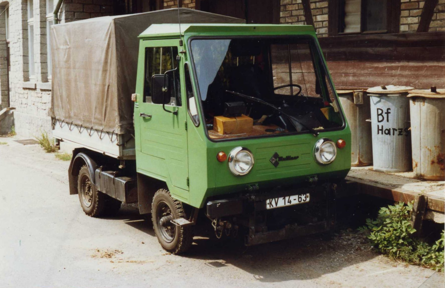 IFA Multicar M 25, Harzgerode, 1989. Registered in Bezirk Halle.